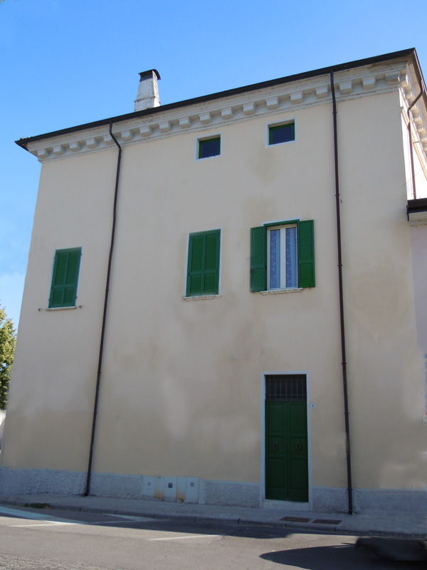 Castel Goffredo, casa del Pretore, del 1600.